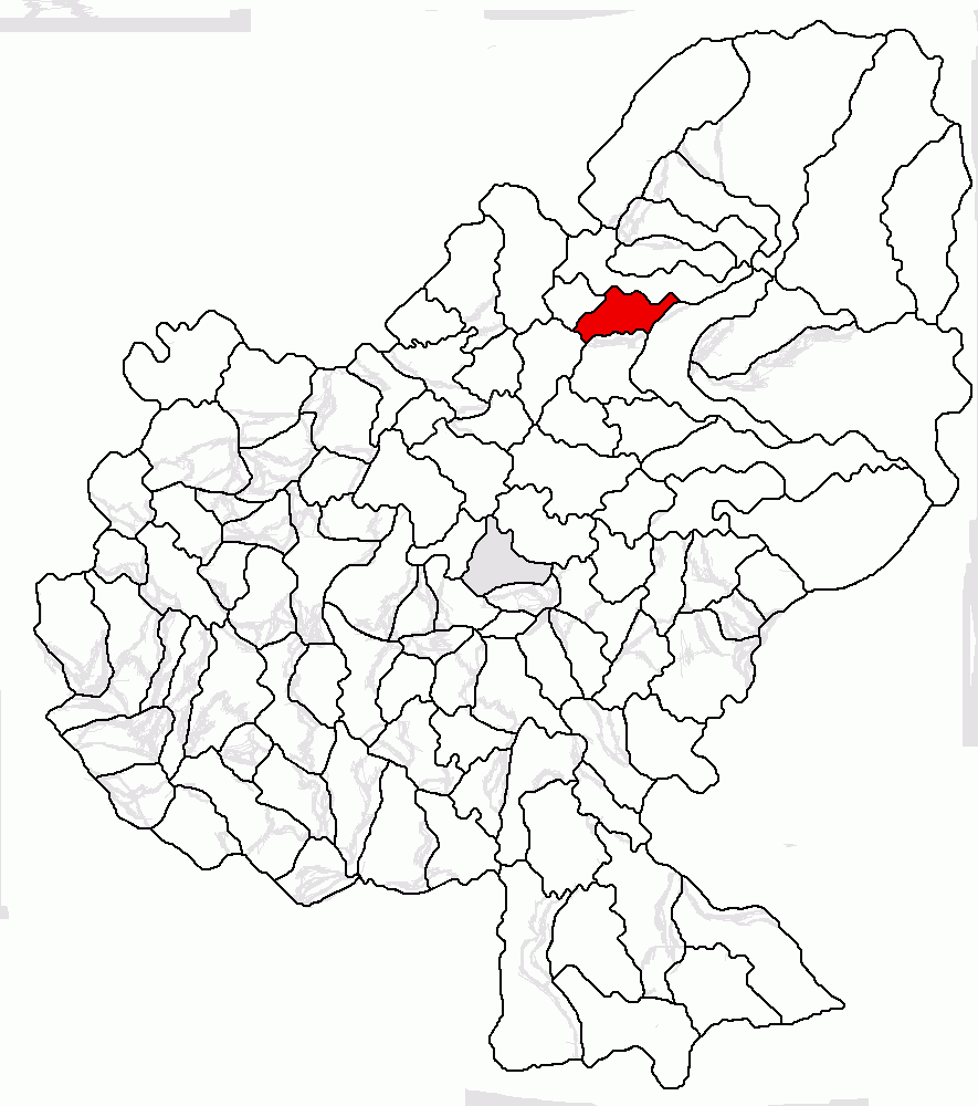 Categorie:Hărţi ale judeţului Mureş